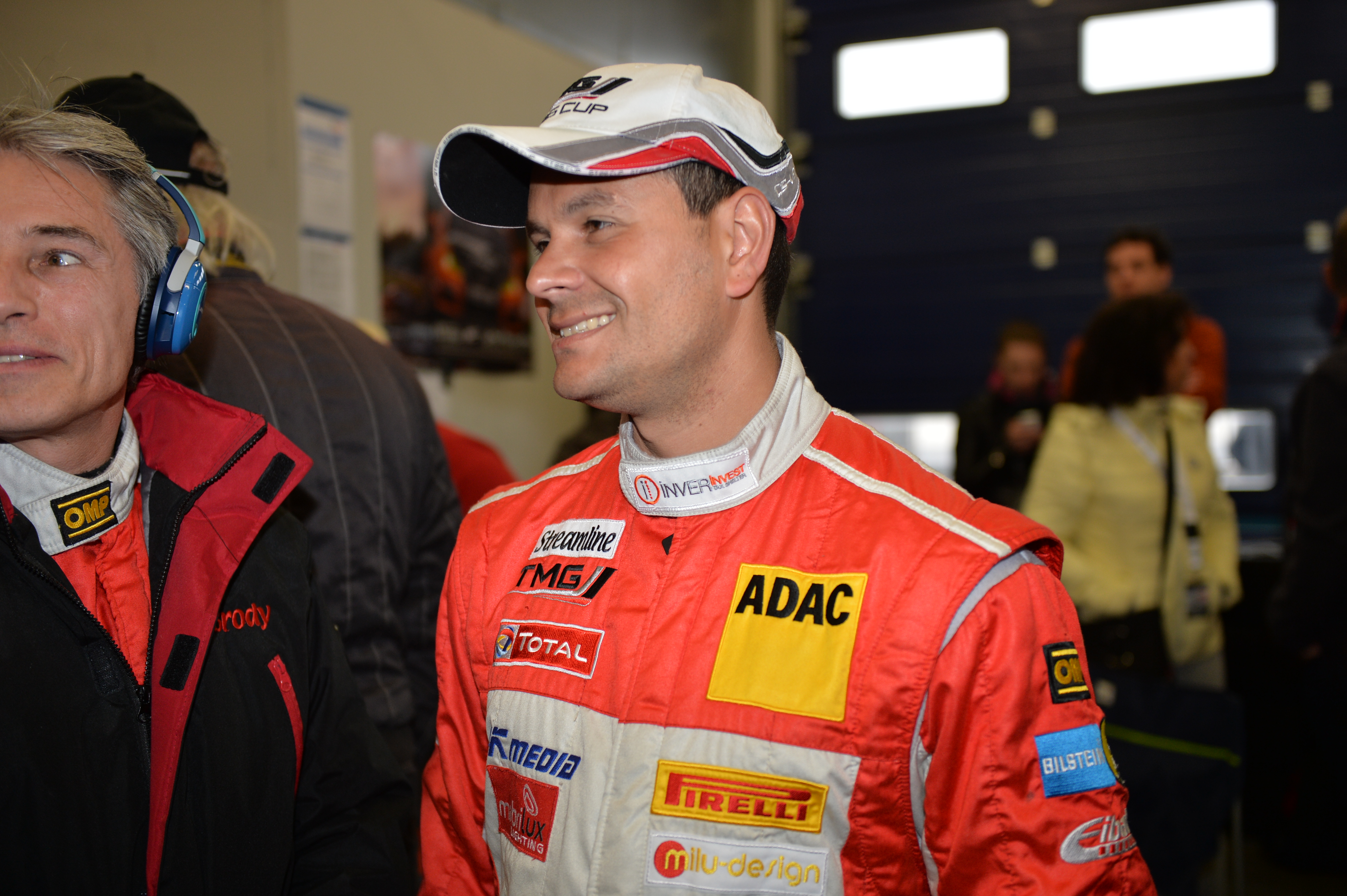 Photo dans le box